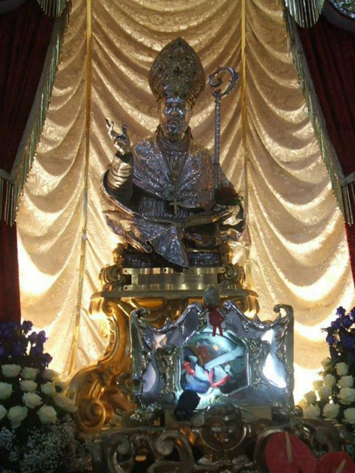 Simulacro argenteo di San Sabino Atripalda (Avellino)